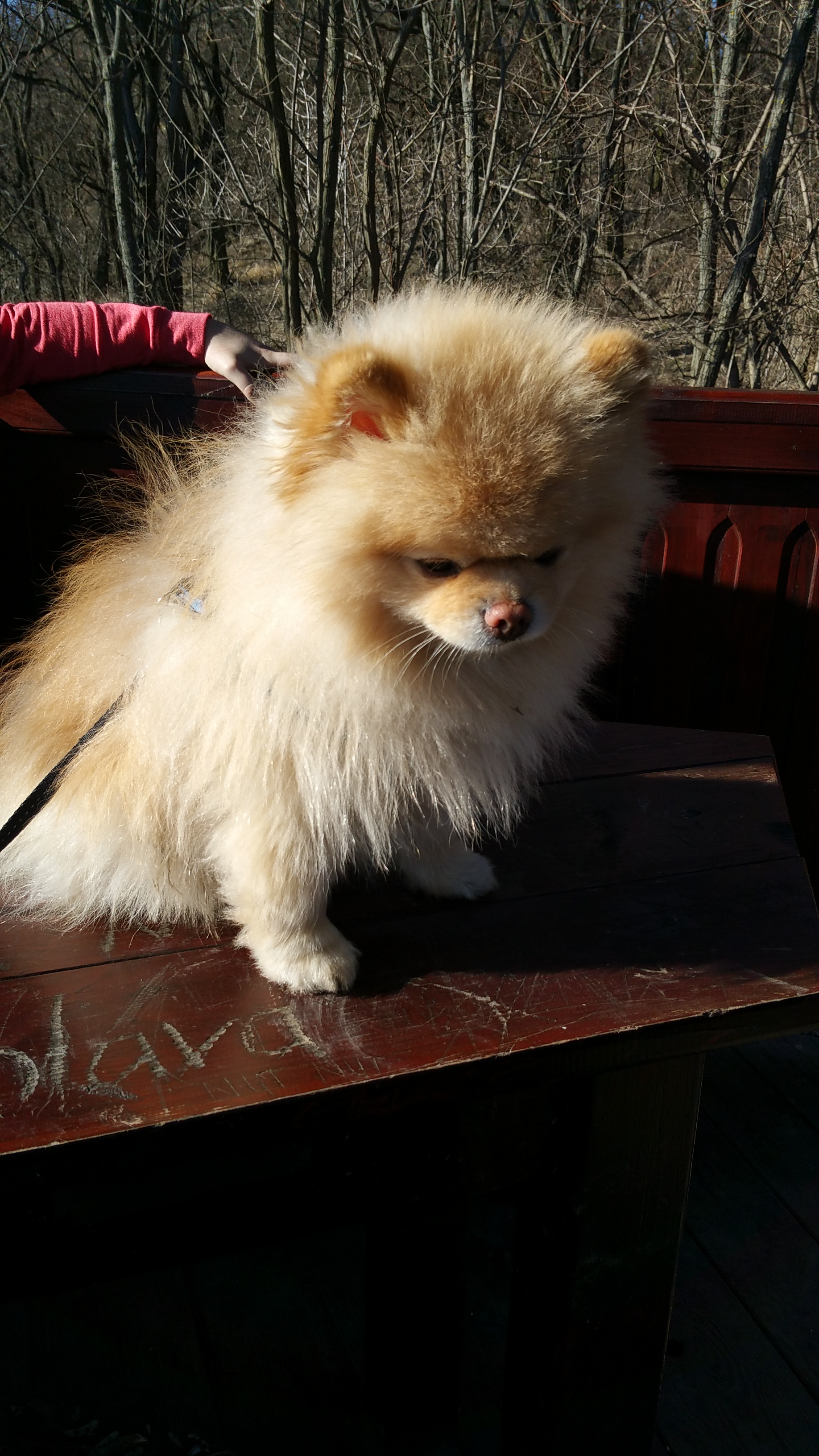 Čistokrevný Pomeranian - Tadeášek z Malebného Povltaví